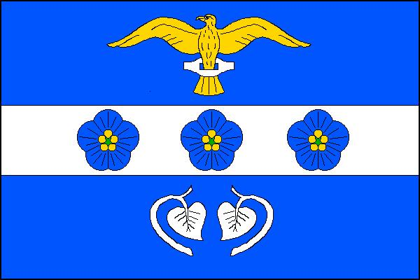 Vlajka obce Jestřebí (okres Náchod)